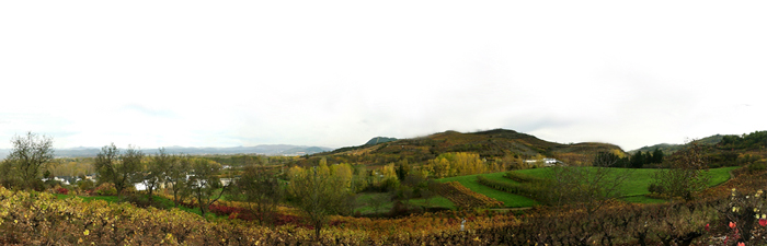 Vista panorámica de Villalibre de la Jurisdicción. León. España.